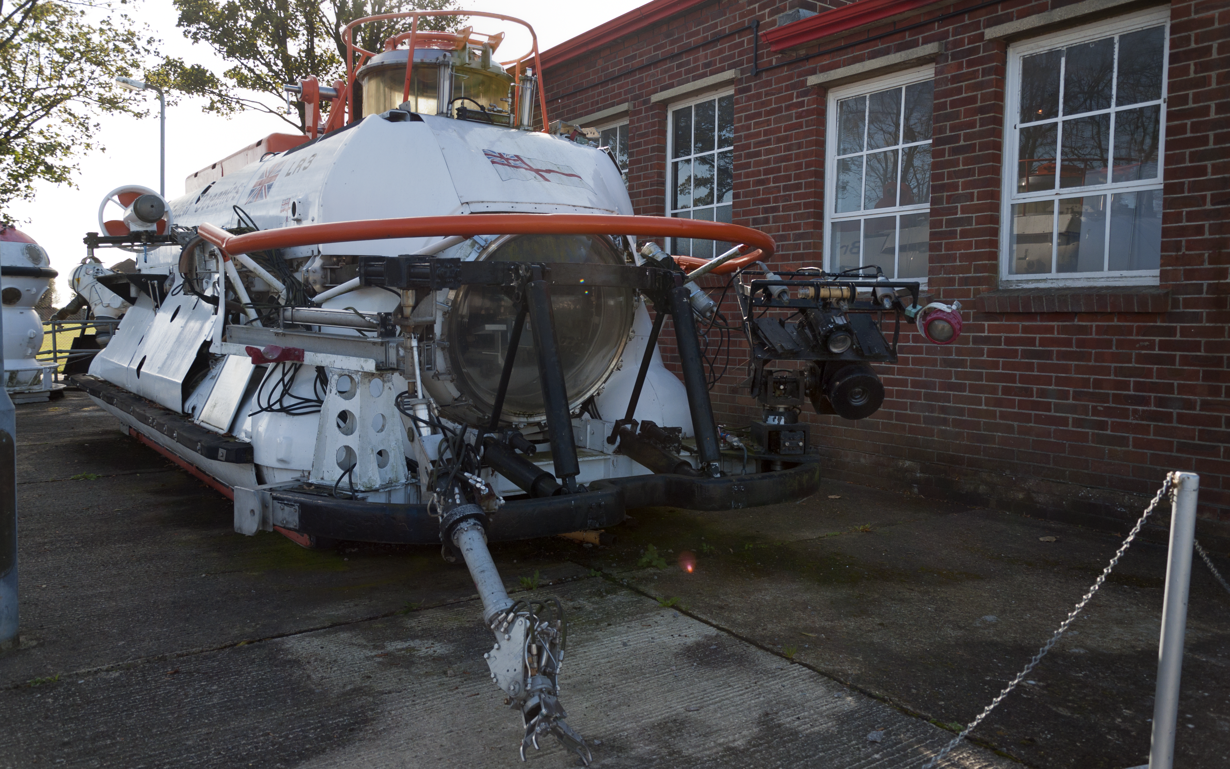 Het duiktuig LR3 in het Royal Navy Submarine Museum te Gosport, Engeland